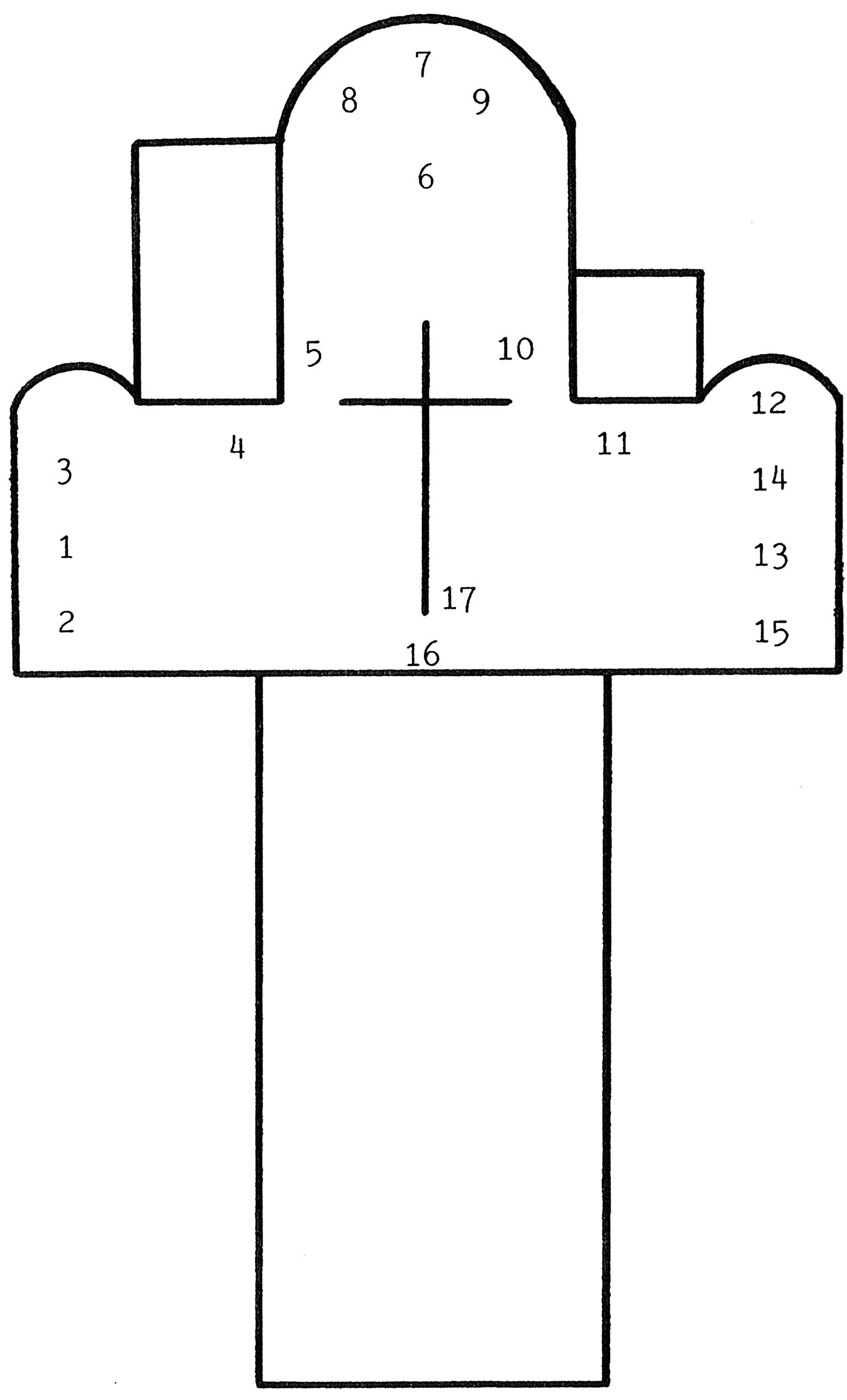 Plan de l'église, avec les repères des œuvres qui s'y trouvent.